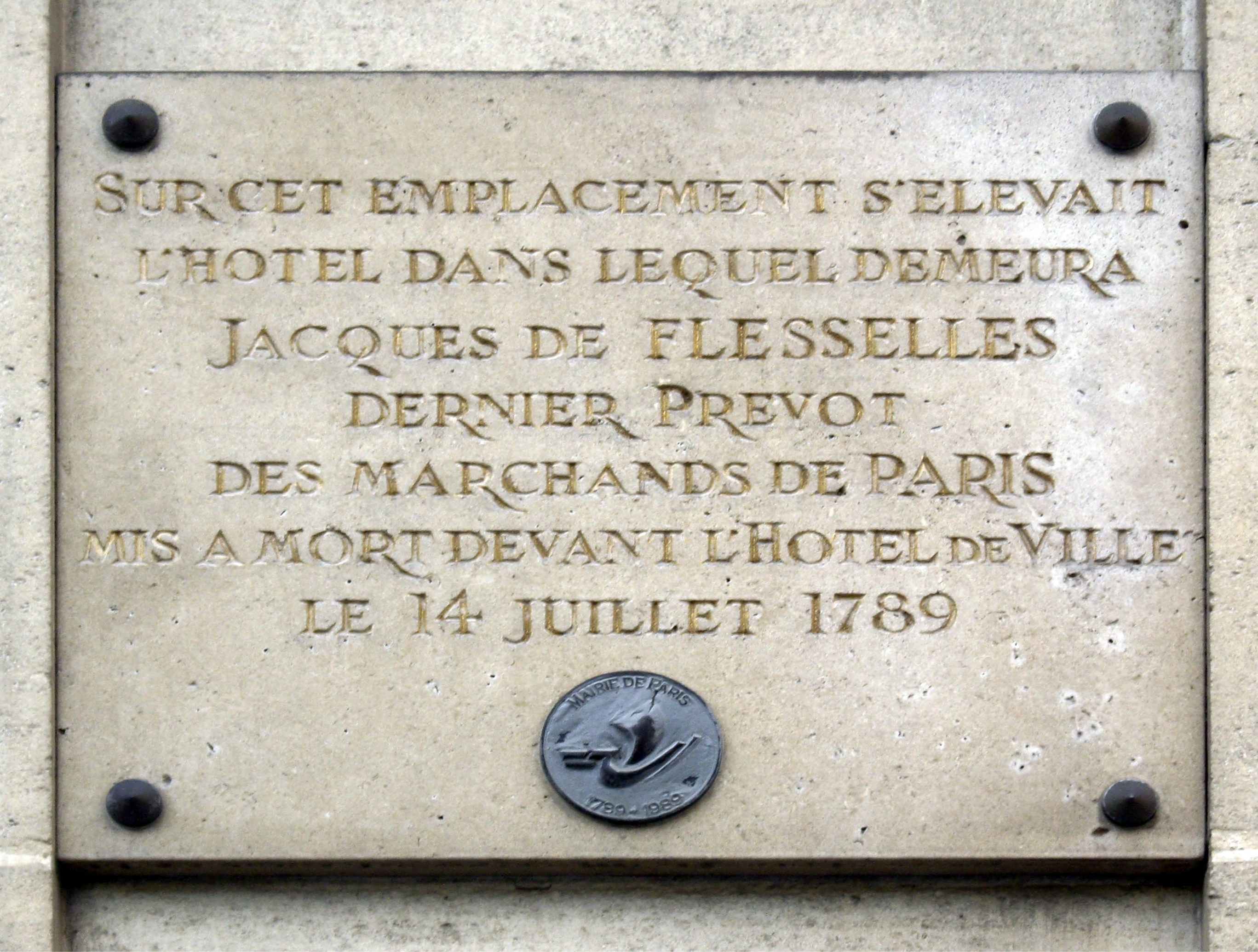 Plaque apposée au n° 52 de la rue de Sévigné, Paris 3e.Sur cet emplacement s'élevait l'hôtel dans lequel demeura Jacques de Flesselles, dernier prévôt des marchands de Paris, mis à mort devant l'hôtel de ville le 14 juillet 1789.